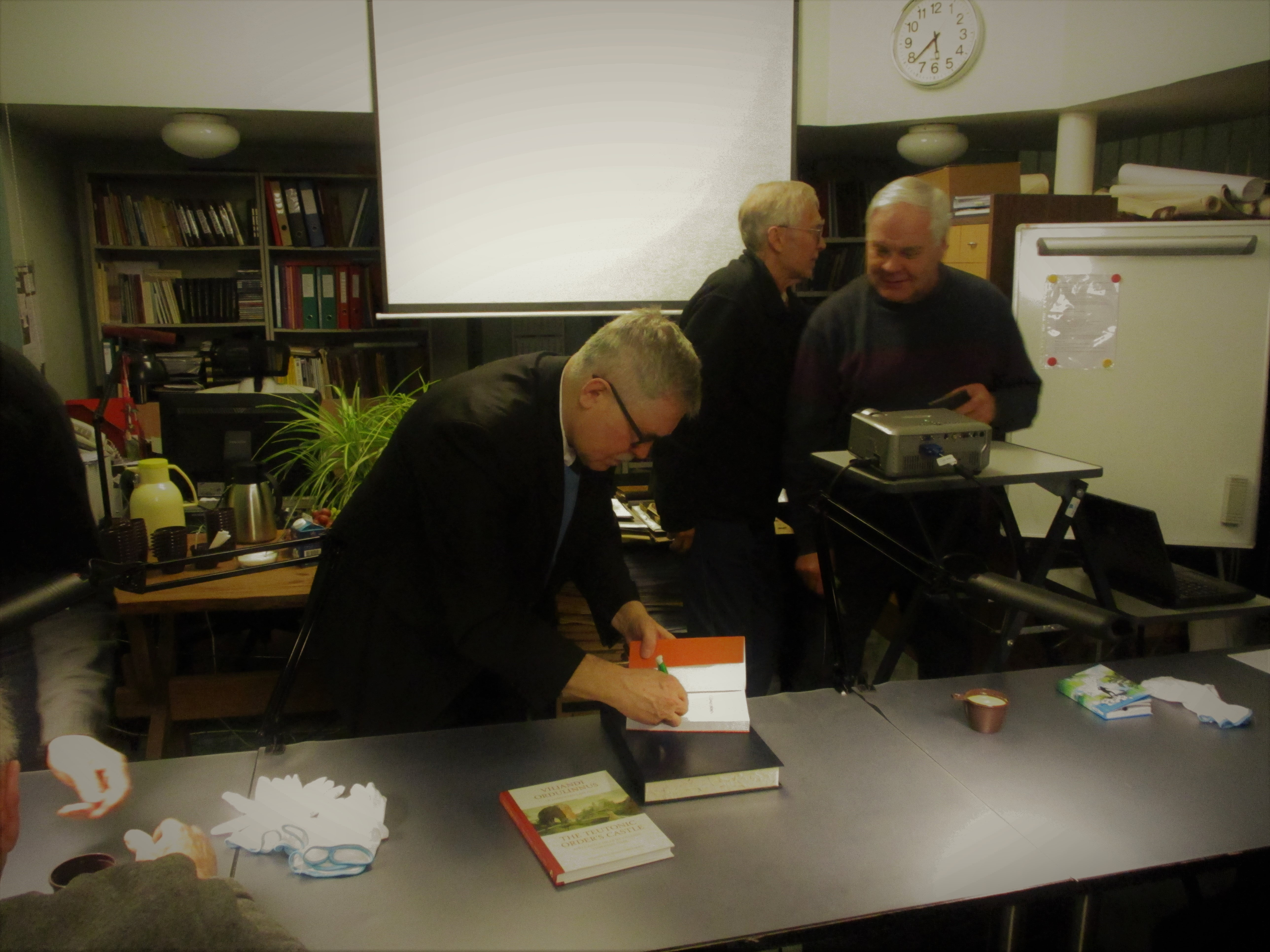 Kirjanik, pedagoog ja poliitik Heiki Raudla on andmas autogrammi oma raamatu "Rõõmus inimene" esitlusel Viljandi Muuseumisõprade Seltsi ettekandeõhtul veebruaris 2018. Viljandi Muuseumisõprade Seltsi ettekandeõhtu 21. veebruaril 2018 Viljandi Muuseumi lugemissaalis.